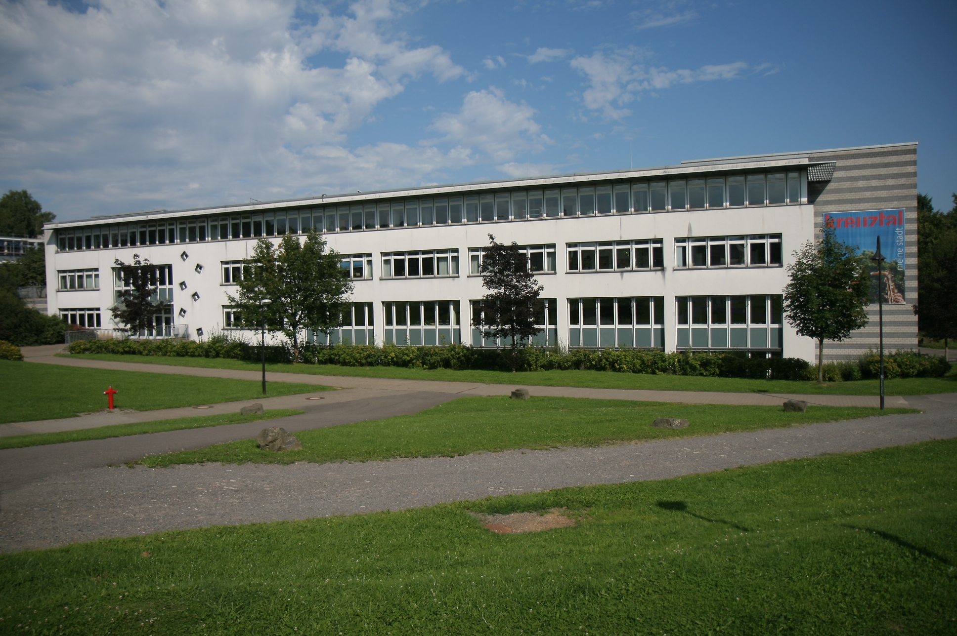 Clara-Schumann-Gesamtschule, Schulzentrum Kreuztal, Djurslandweg 2.